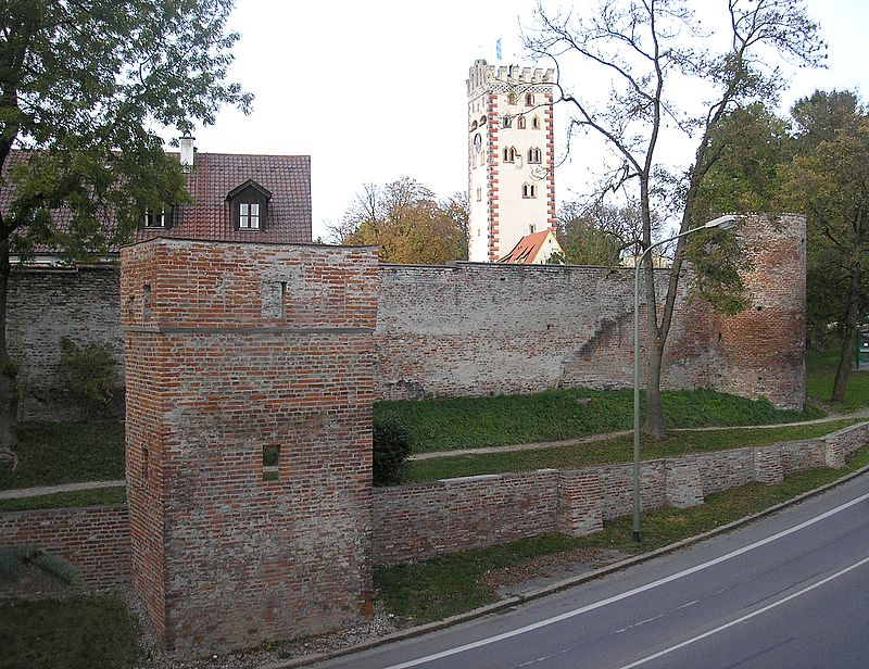 Landsberg am Lech (Oberbayern). Stadtmauer an der „Neuen Bergstraße“ und „Bayertor“. Eigene Aufnahme, Okt. 2006 / Landsberg am Lech (Upper Bavaria, Germany). City wall at the “Neue Bergstrasse” and “Bayertor” (“Bavarian gate”). Own photo, Oct. 2006